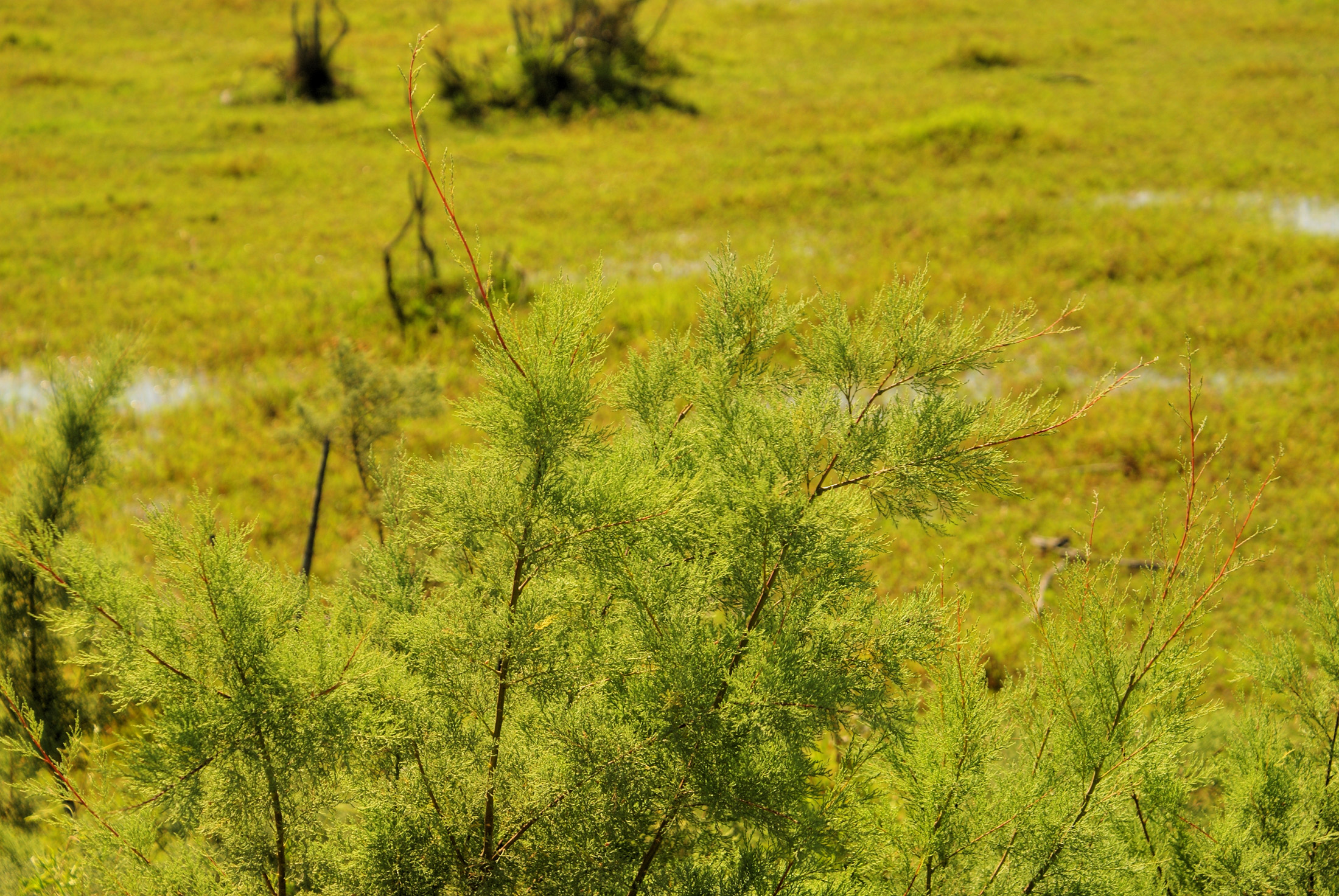 Small Tamarisk (Tamarix sp.)